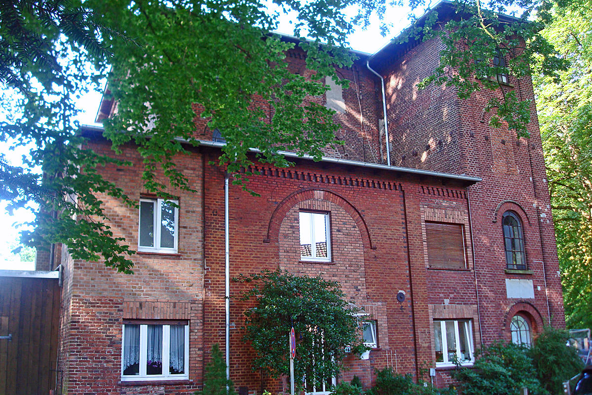 Wassermühle Sundern, gen. "Avenstroths Mühle" in Gütersloh This is a photograph of an architectural monument. 016